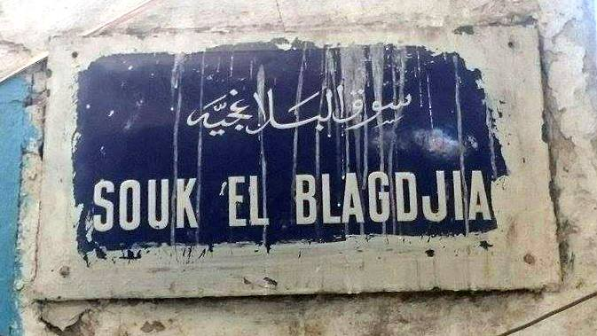 plaque métallique a l'entrée de Souk El Blaghjia